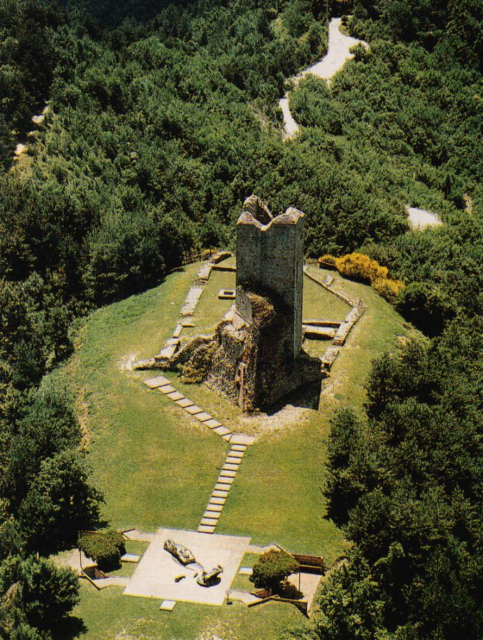 Centro di Documentazione sulla Guerra di Liberazione - Casola Valsenio (RA)